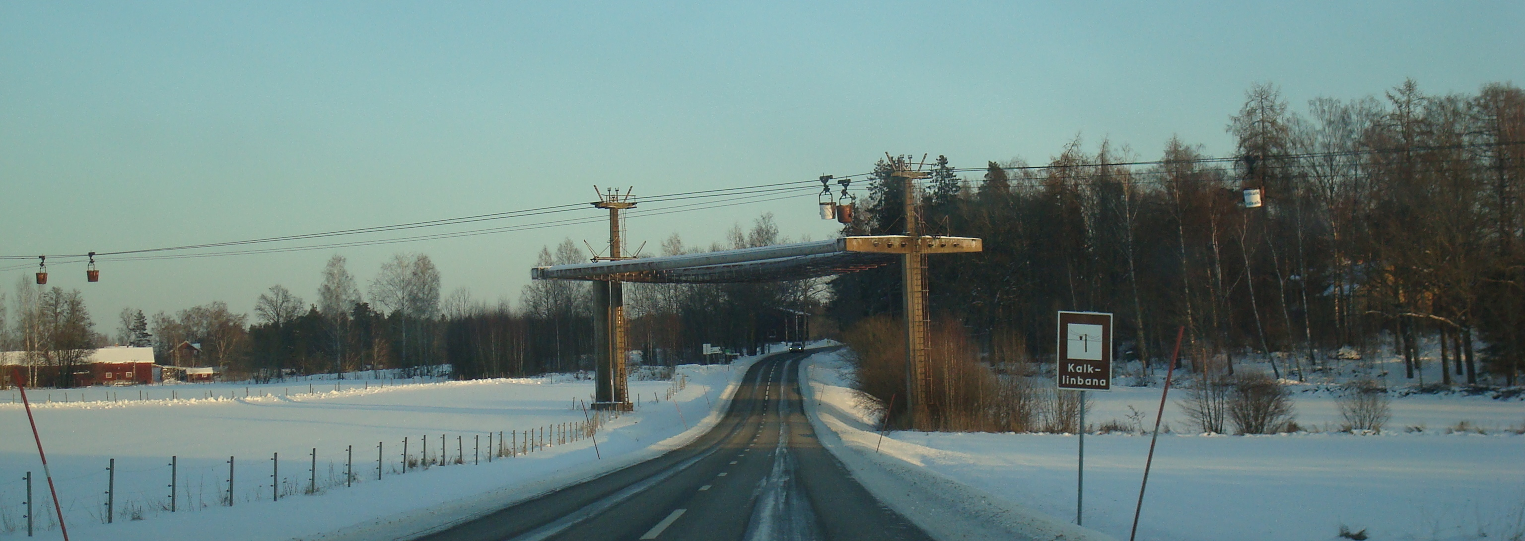 Forsby kalklinbana korsar Länsväg 214, vintern 2010.